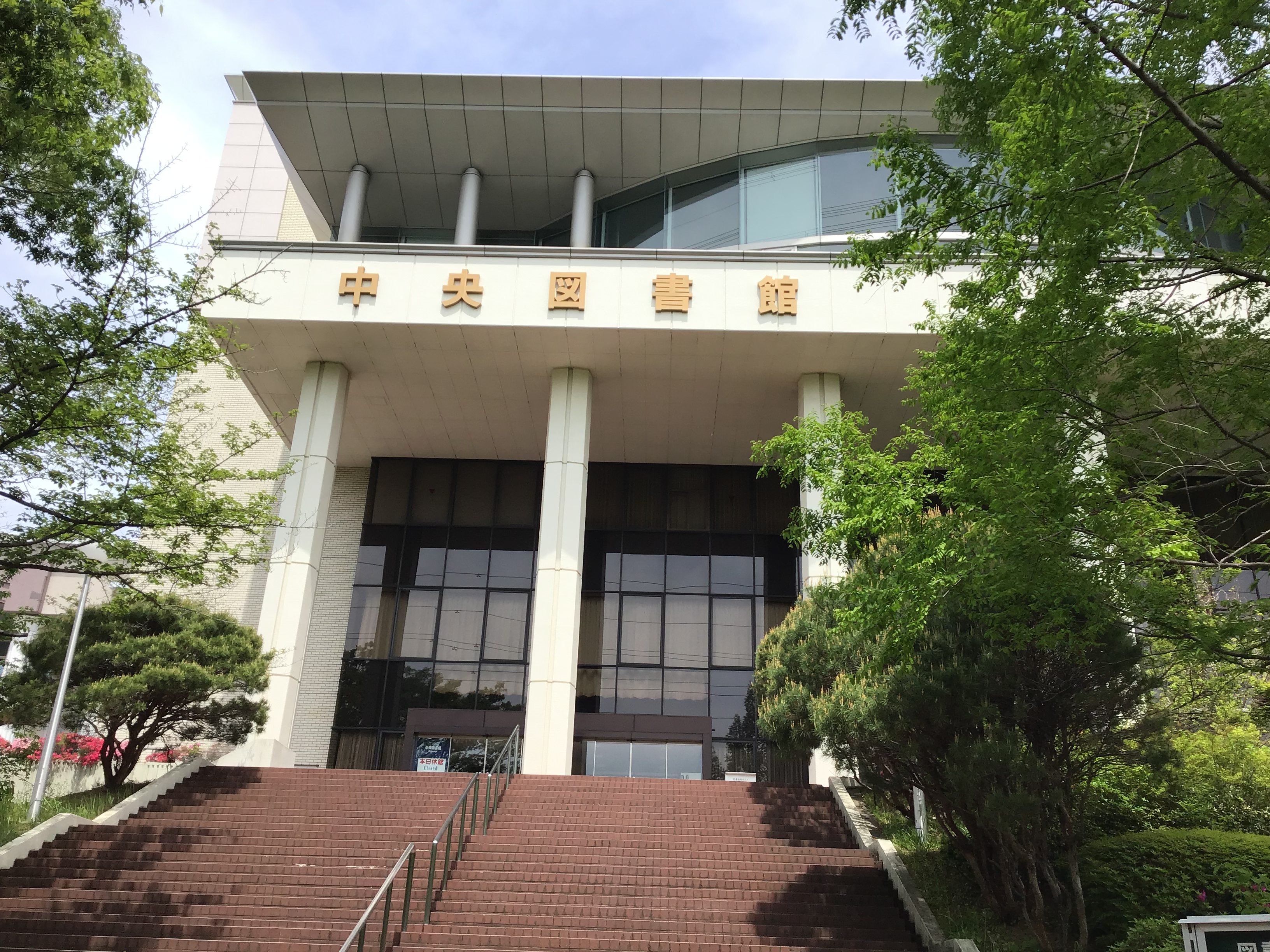 創価大学中央図書館。八王子市。